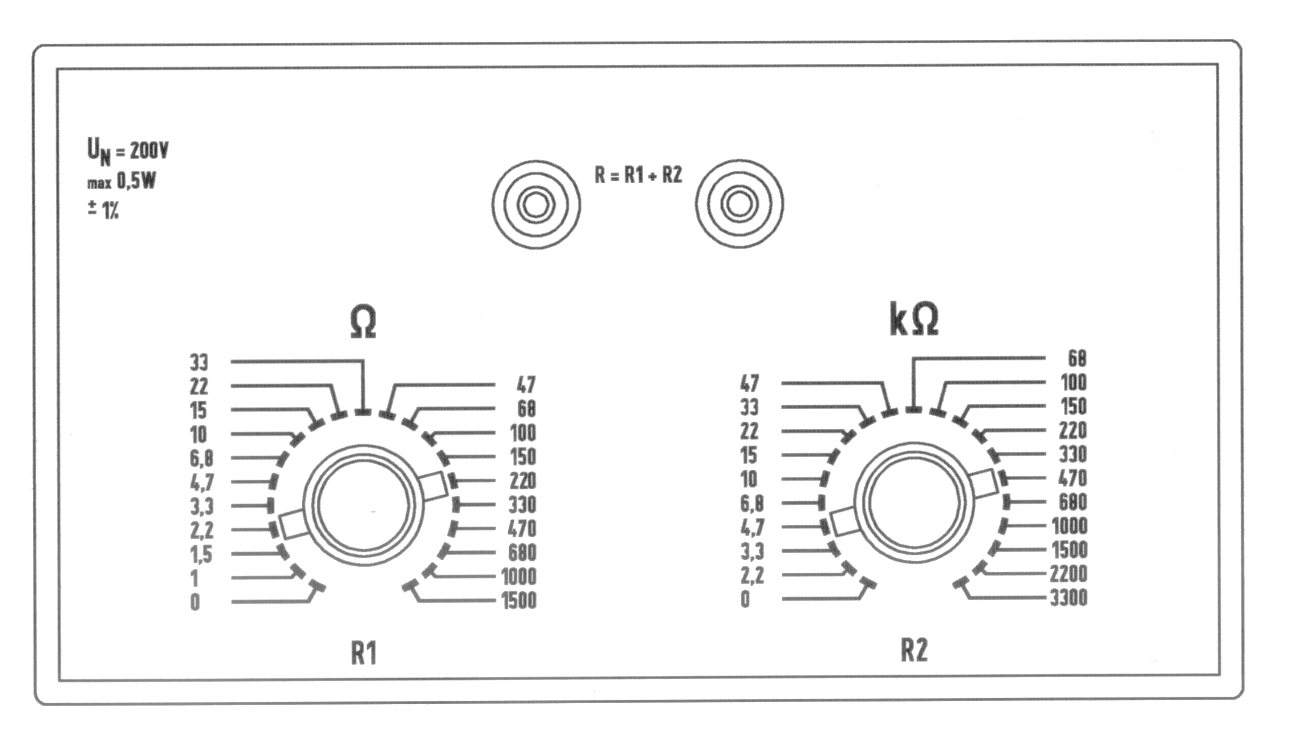 Logádellenállás előlnézete